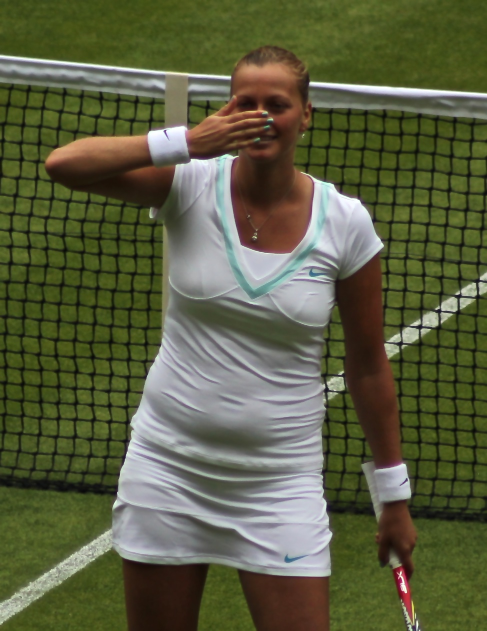 Petra Kvitova